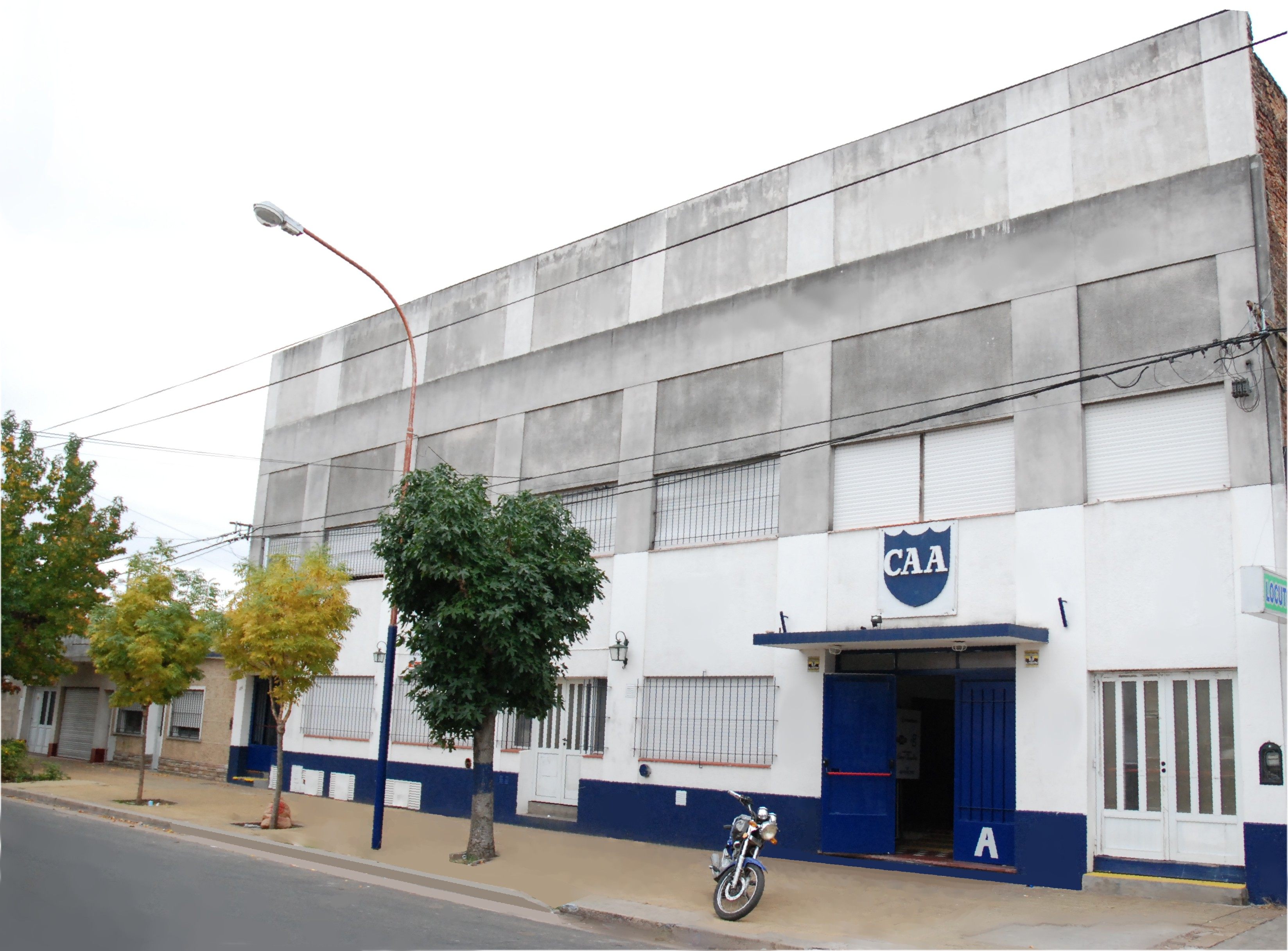 Sede social del Club Argentino de la ciudad de Junín, Argentina.